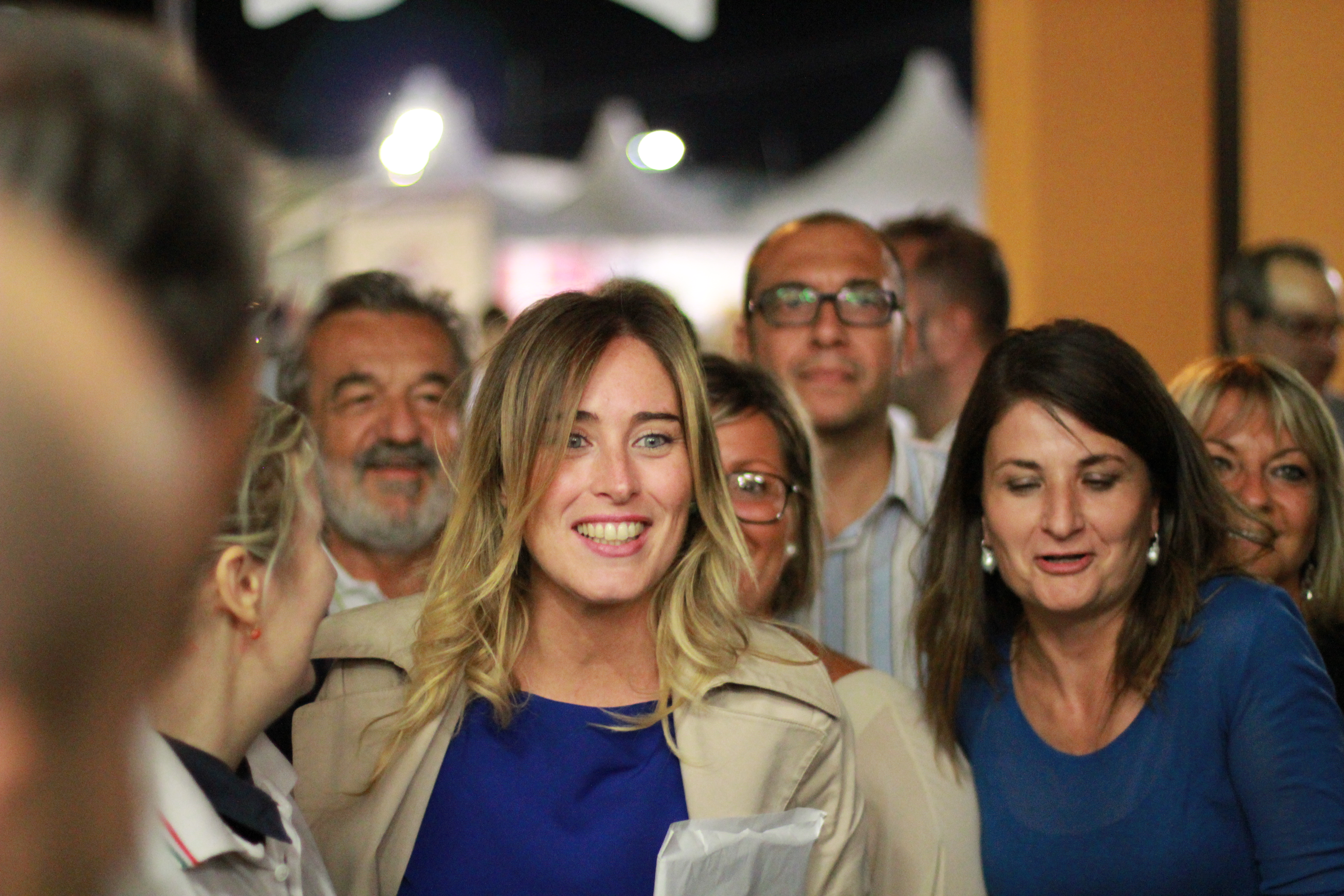 Maria Elena Boschi - Festa Nazionale e Provinciale de L'Unità - Mille giorni per il futuro - Bologna, 1 settembre 2014